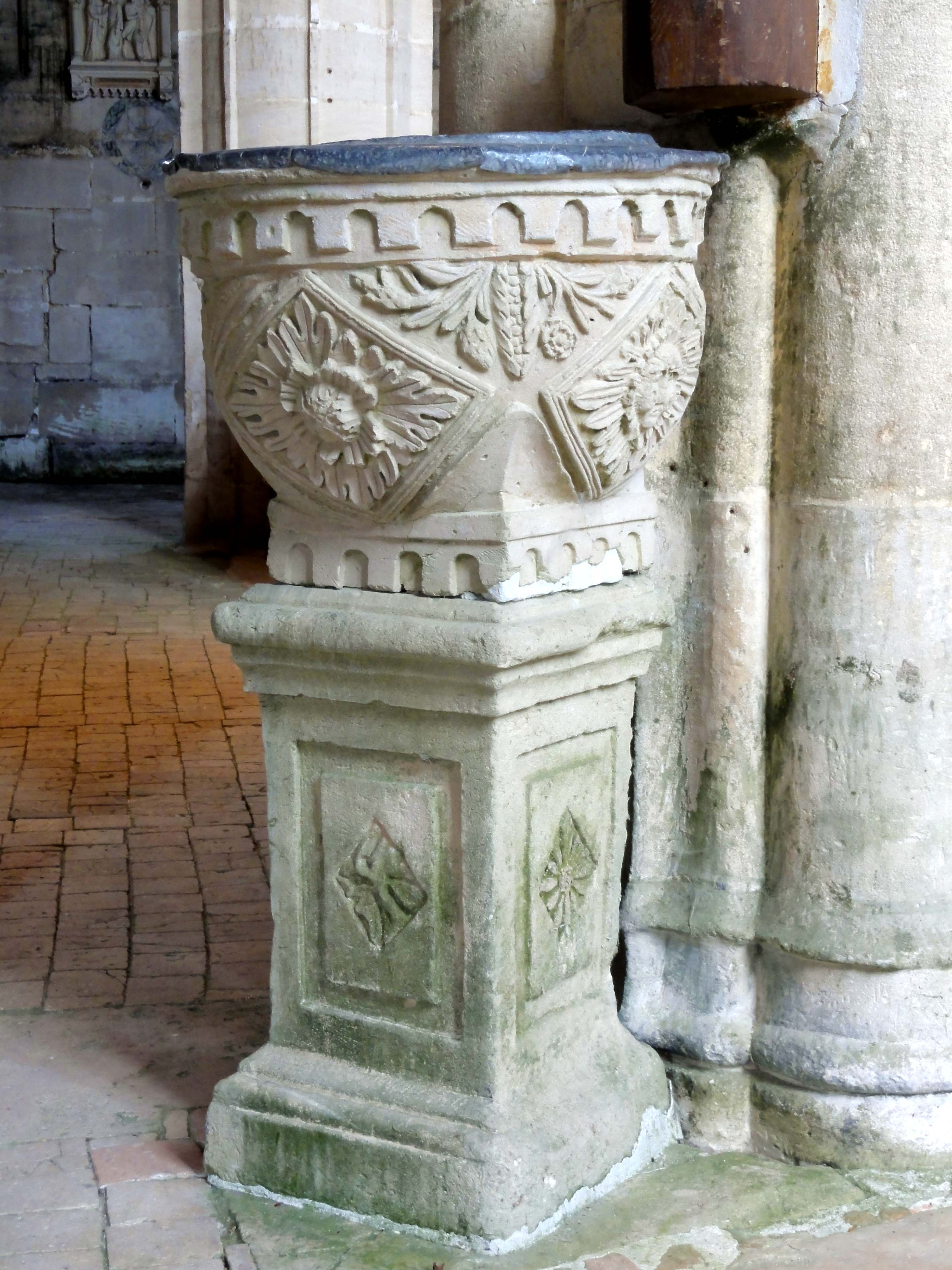 Mobilier de l'église - voir le titre du fichier.